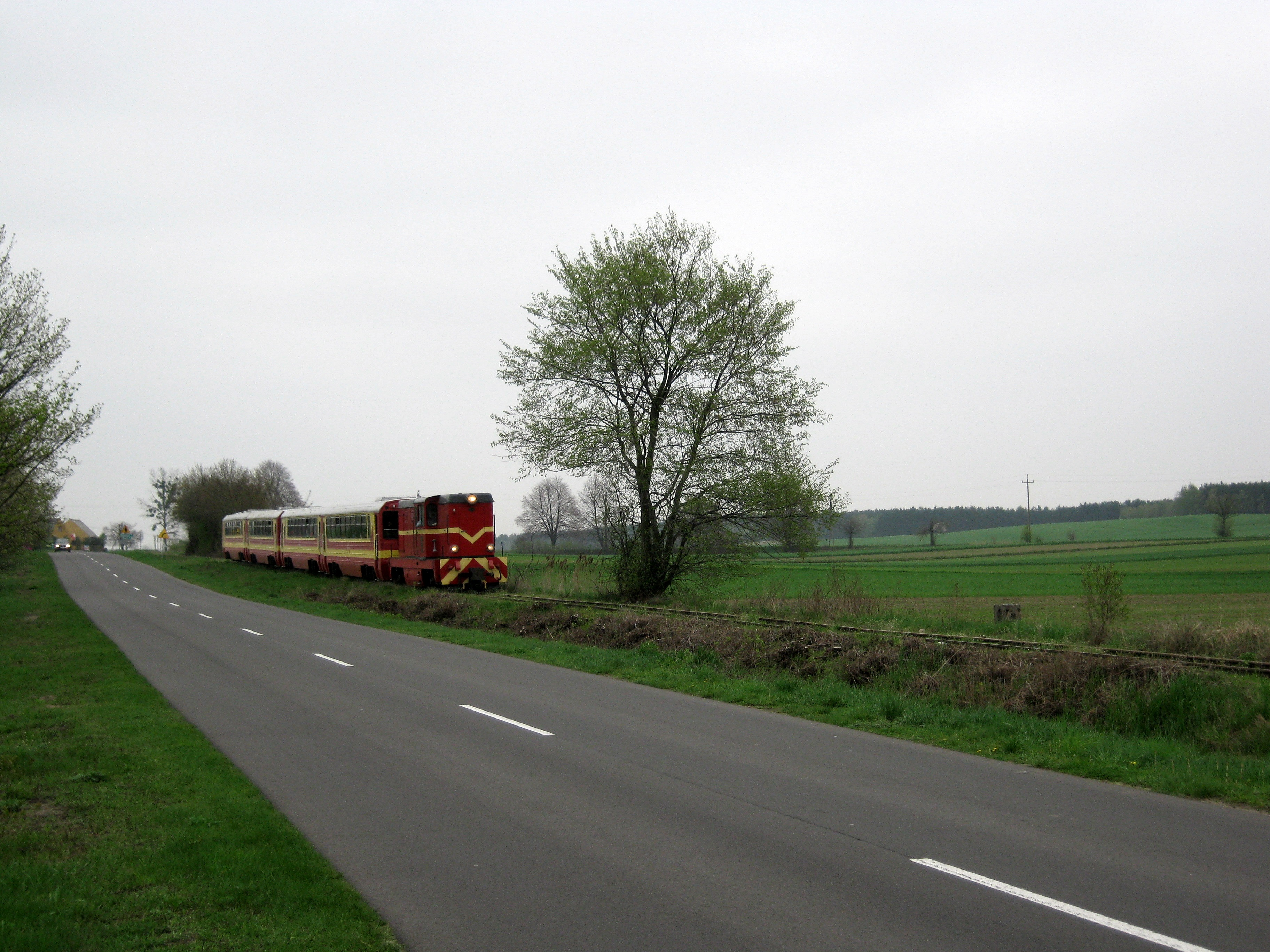 Lxd2-369 z pociągiem specjalnym w Wiekowie